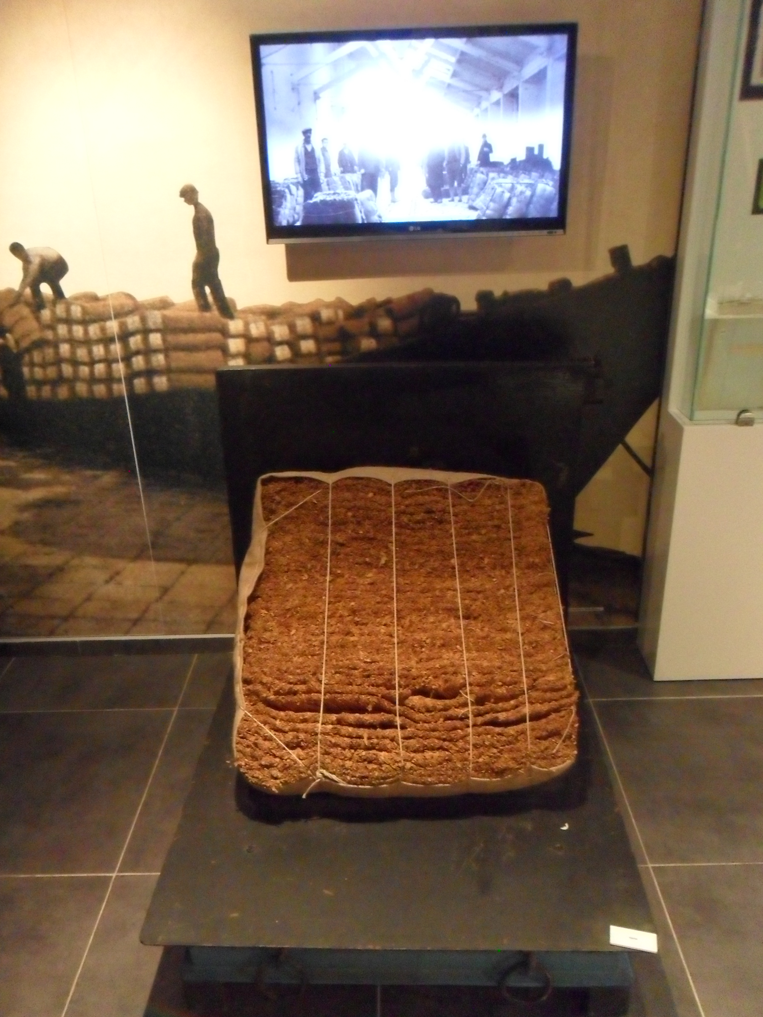 Samsun Şehir Müzesi'nde sergilenen Samsun tütün fabrikasına ait bir kantar ve tütün.